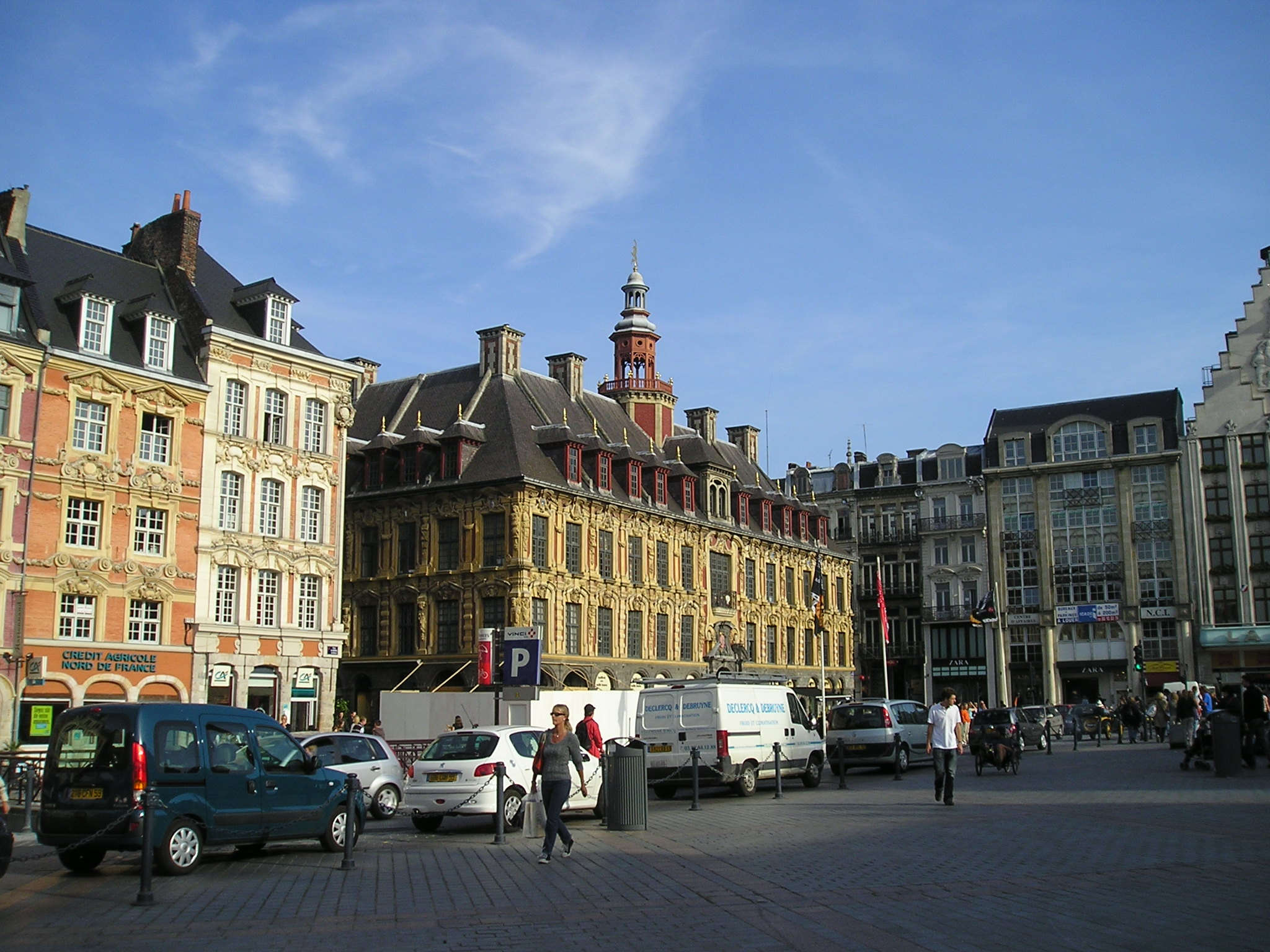 LILLE : Grand Place